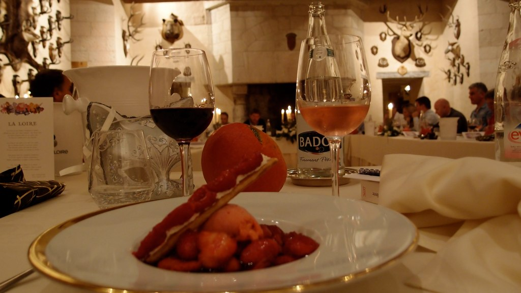 Chinon et gastronomie